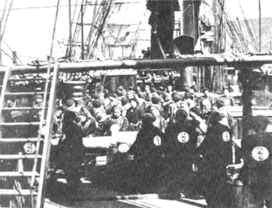 Yangwu sailors